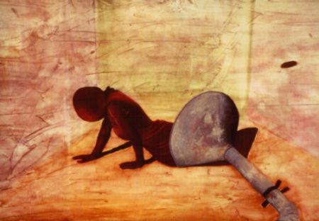 שמו על בד ציור